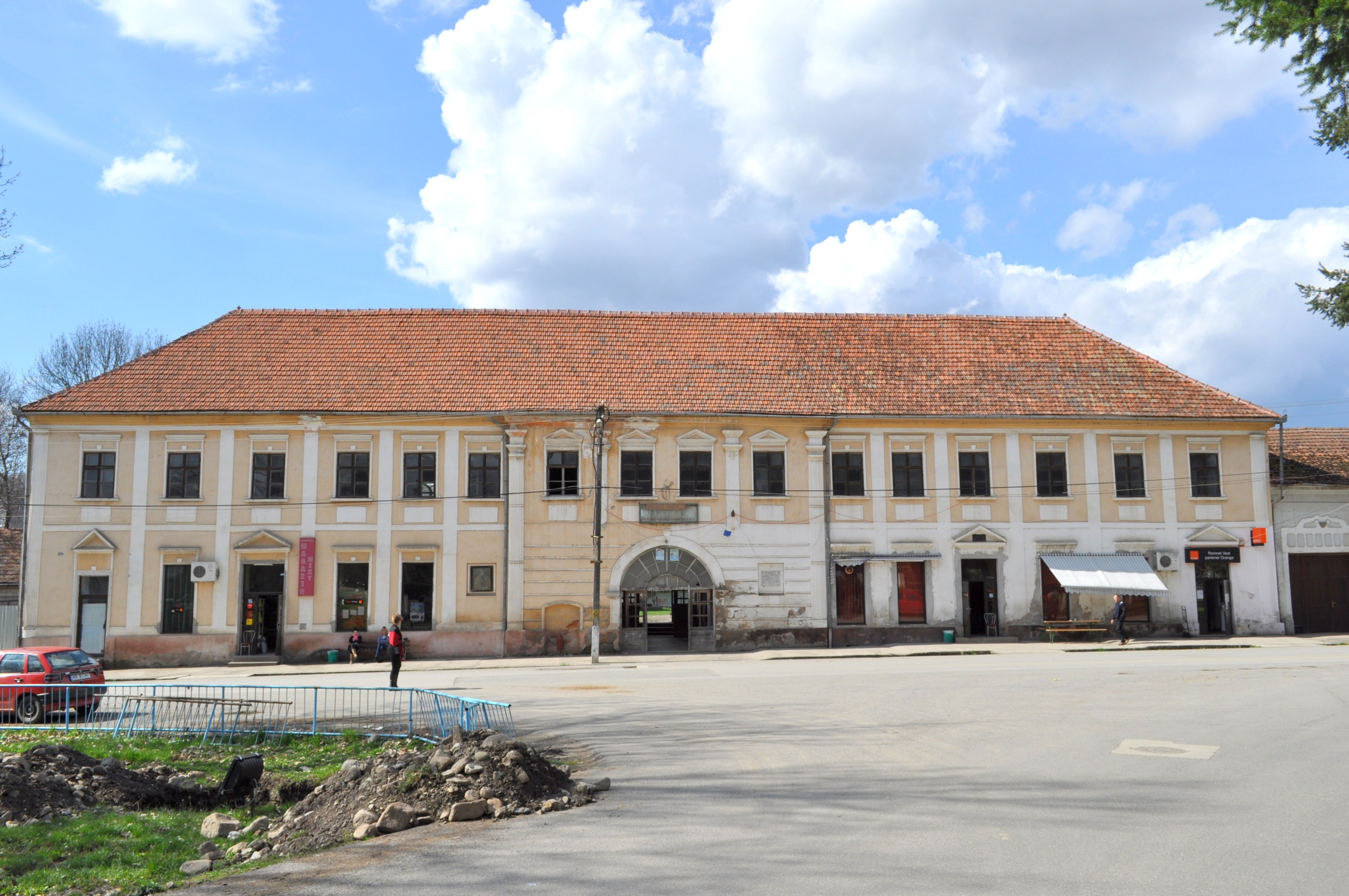 Hanul "Birtul Mare" (fostă staţie de poştalion)